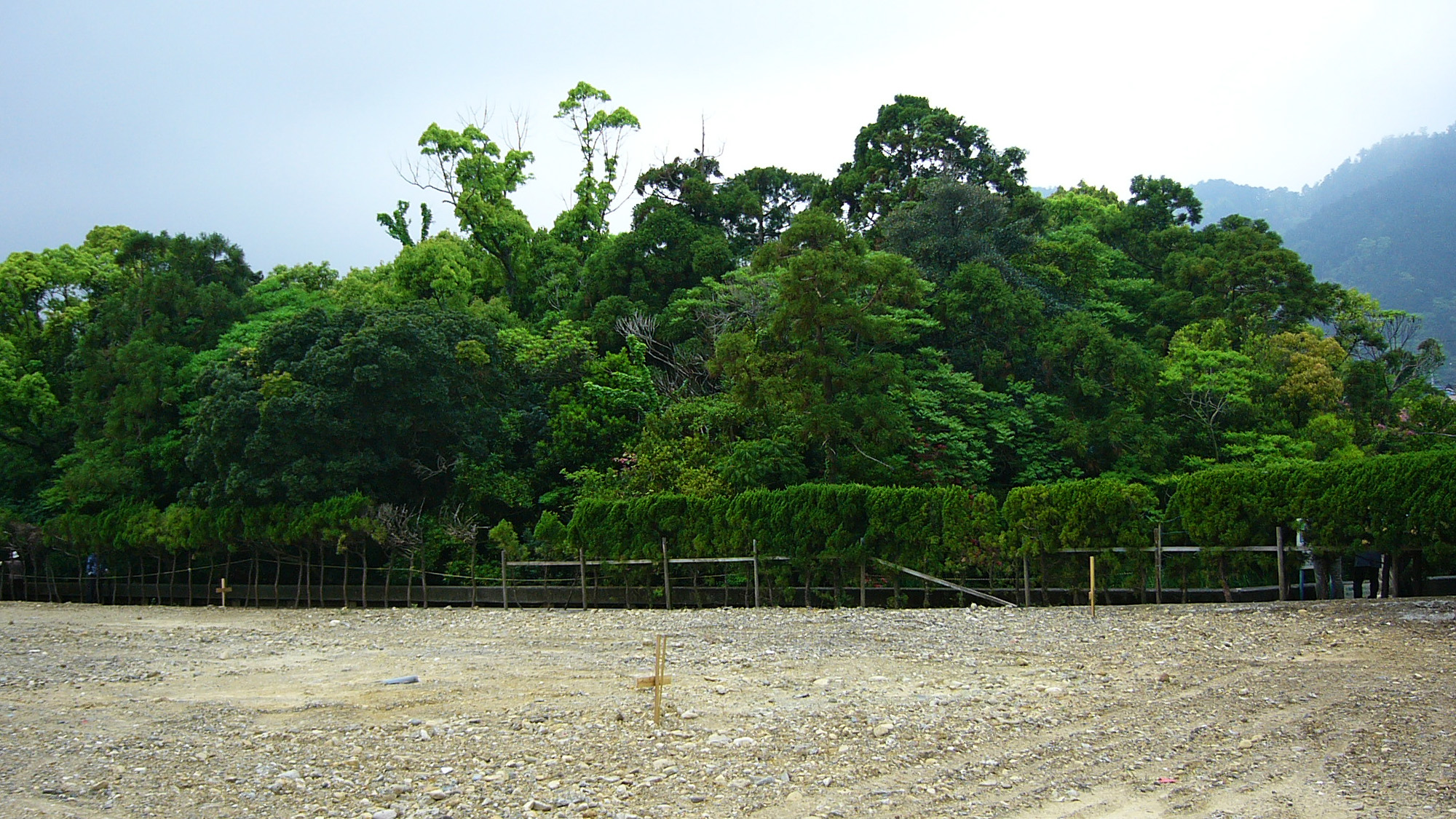 Ukishima-no-mori in Shingu, Wakayama Prefecture